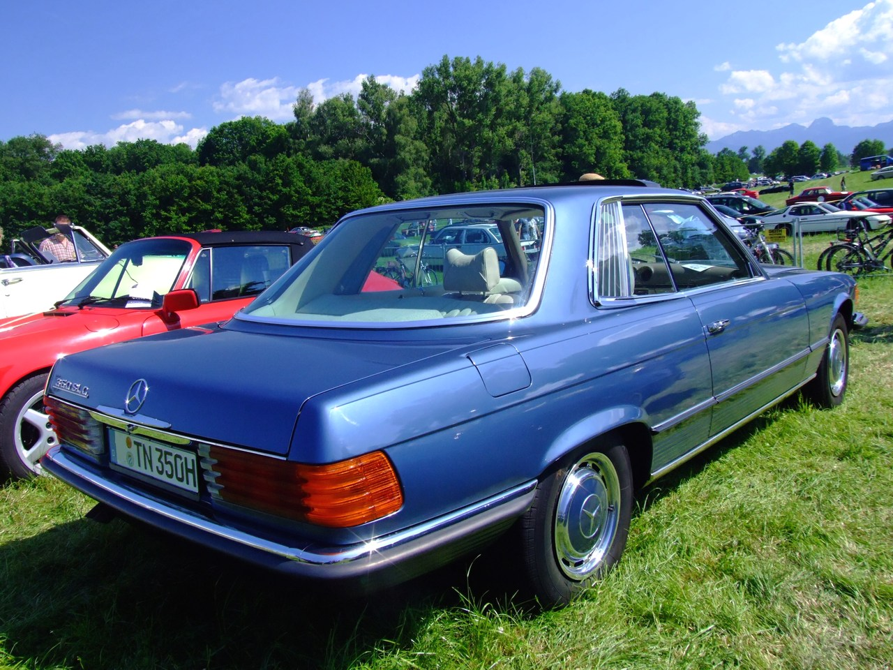 Quelle: selbst fotografiert, 06/2007 Fotograf: Späth Chr.